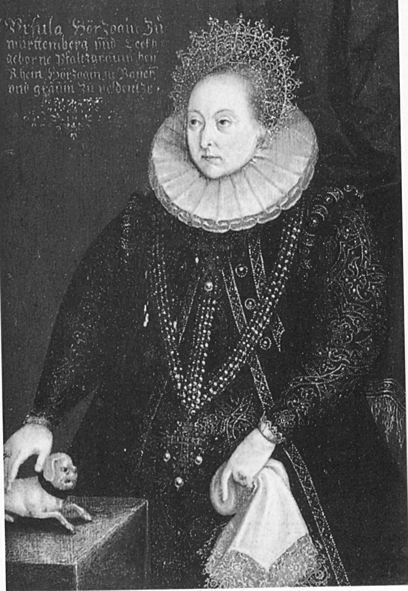 zweite Gemahlin von Herzog Ludwig I. von Württemberg, Gemälde